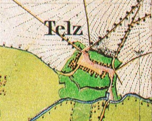 Telz auf dem Urmesstischblatt von 1840, Blatt 3746 Zossen, Telz, Stadt Mittenwalde, Brandenburg, Deutschland